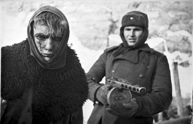 Russland, deutscher Kriegsgefangener ADN-Zentralbild/Archiv II Weltkrieg 1939-45 Die Schlacht um Stalingrad vom 17.7.1942 bis 2.2.1943. Nach der Kapitulation der faschistischen deutschen Truppen am 31.1. und 2.2.1943 gingen 91 000 Überlebende in die Gefangenschaft. Ein junger Soldat und fanatischer Nazi, der dieses Ende noch nicht begriffen hat. [Sowjetunion.- Sowjetischer Soldat mit Maschinenpistole PPSch-41 bei Bewachung eines verletzten, deutschen kriegsgefangenen Soldaten] Information added by Wikimedia users.A wounded German POW taken at the Battle of Stalingrad. English translation of the original image caption: The Battle of Stalingrad from 7 July 1942 through 2 Feb 1943 After the capitulation of the fascist German troops on 31 January and 2 February, 91,000 survivors became prisoners of war. A younger soldier and fanatical Nazi, who has not realized this end, yet.